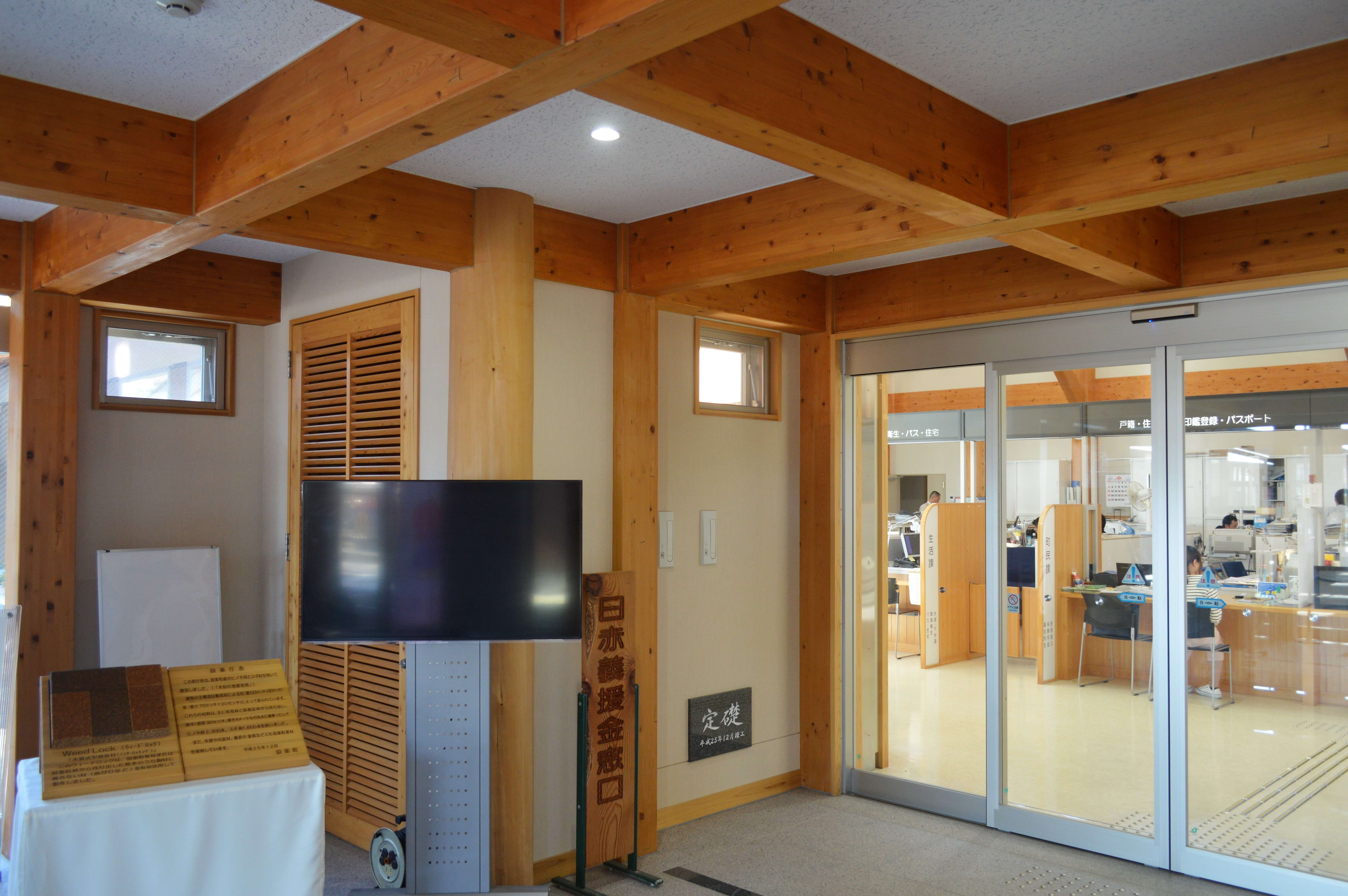 設楽町役場の入口。